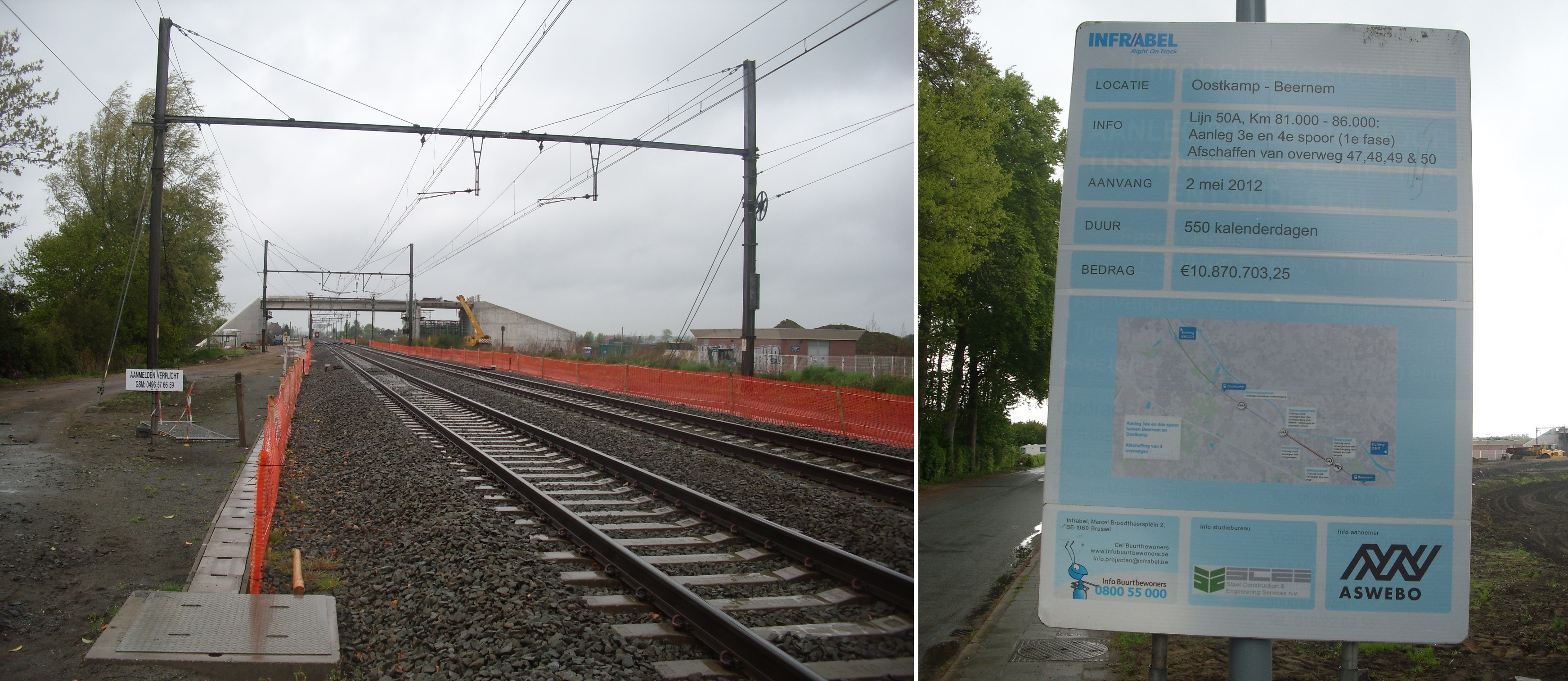 Betonbrug over de Spoorlijn 50A in Beernem - West-Vlaanderen - België